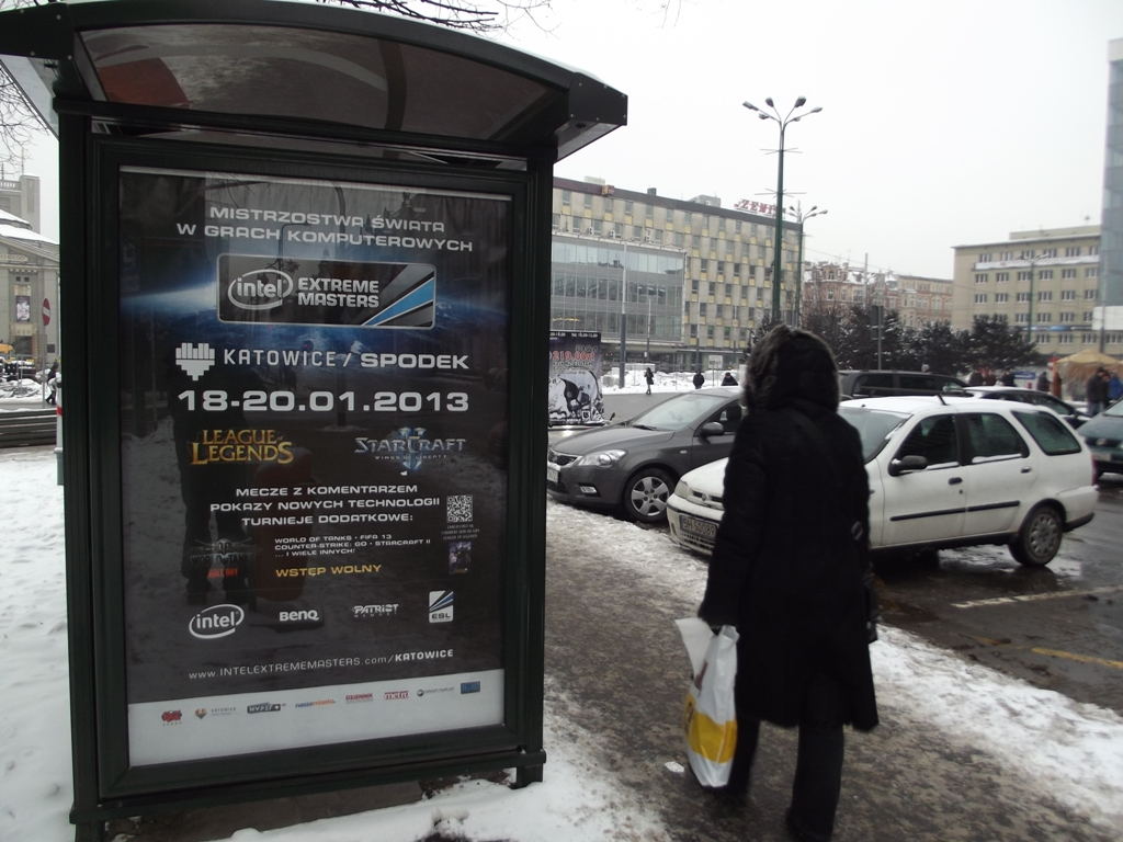 Zdjęcie zrobione podczas Intel Extreme Masters 2013 w katowickim Spodku.